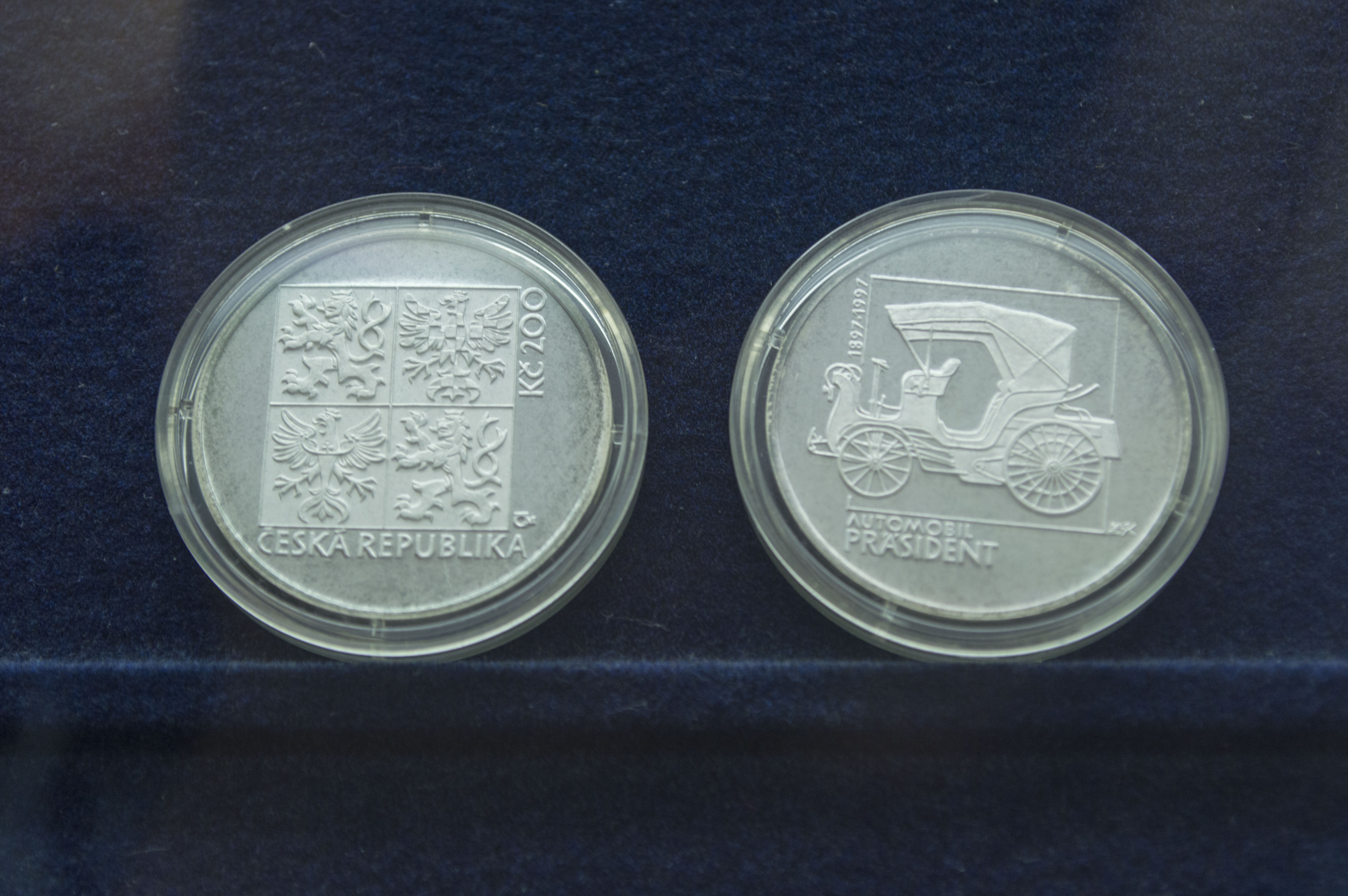 Muzeum skla a bižuterie v Jablonci nad Nisou.